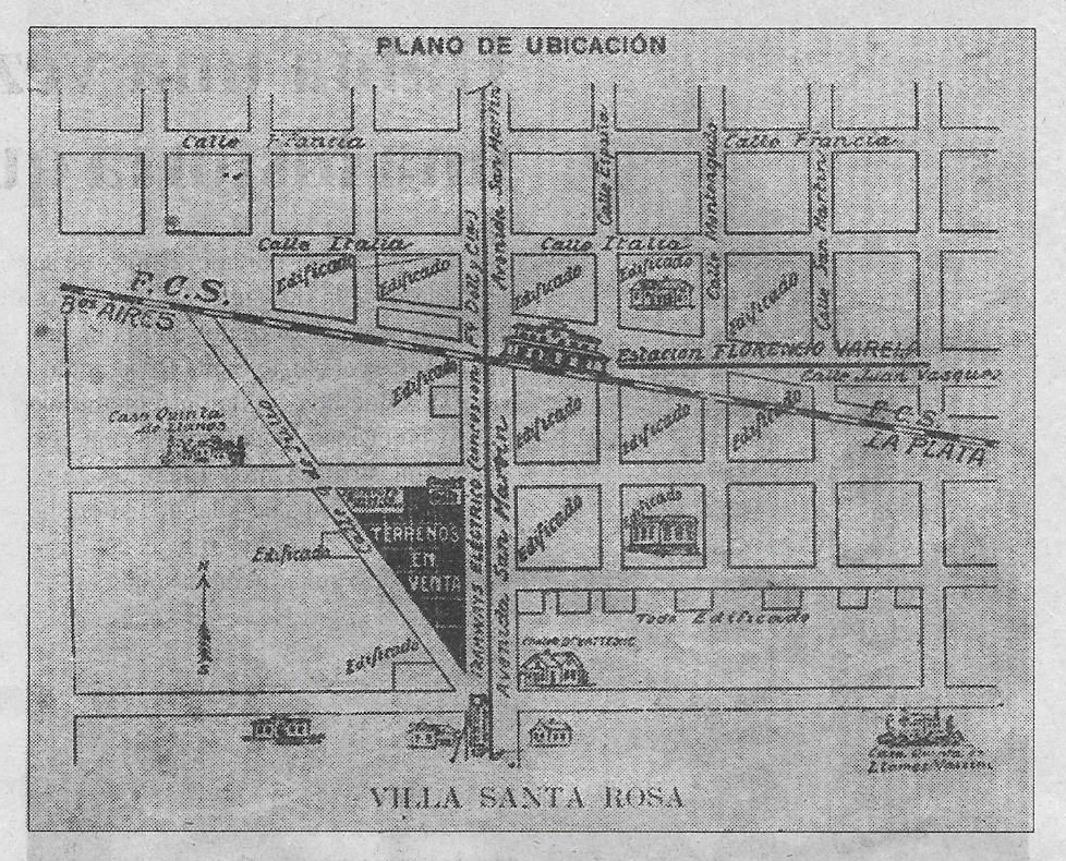 Plano loteos Villa Santa Rosa (Archivo El Varelense)